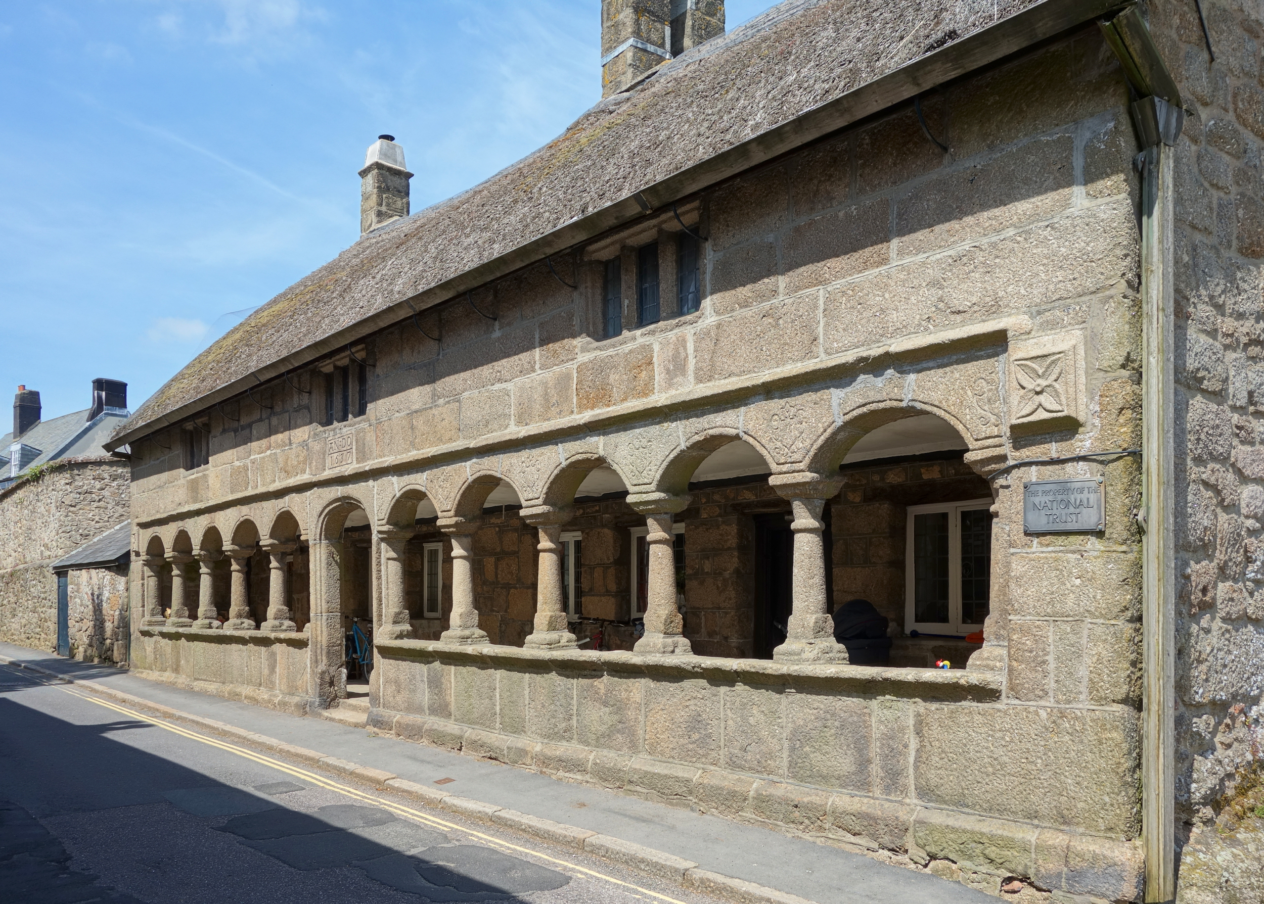 Les Alms Houses de Moretonhampstead.